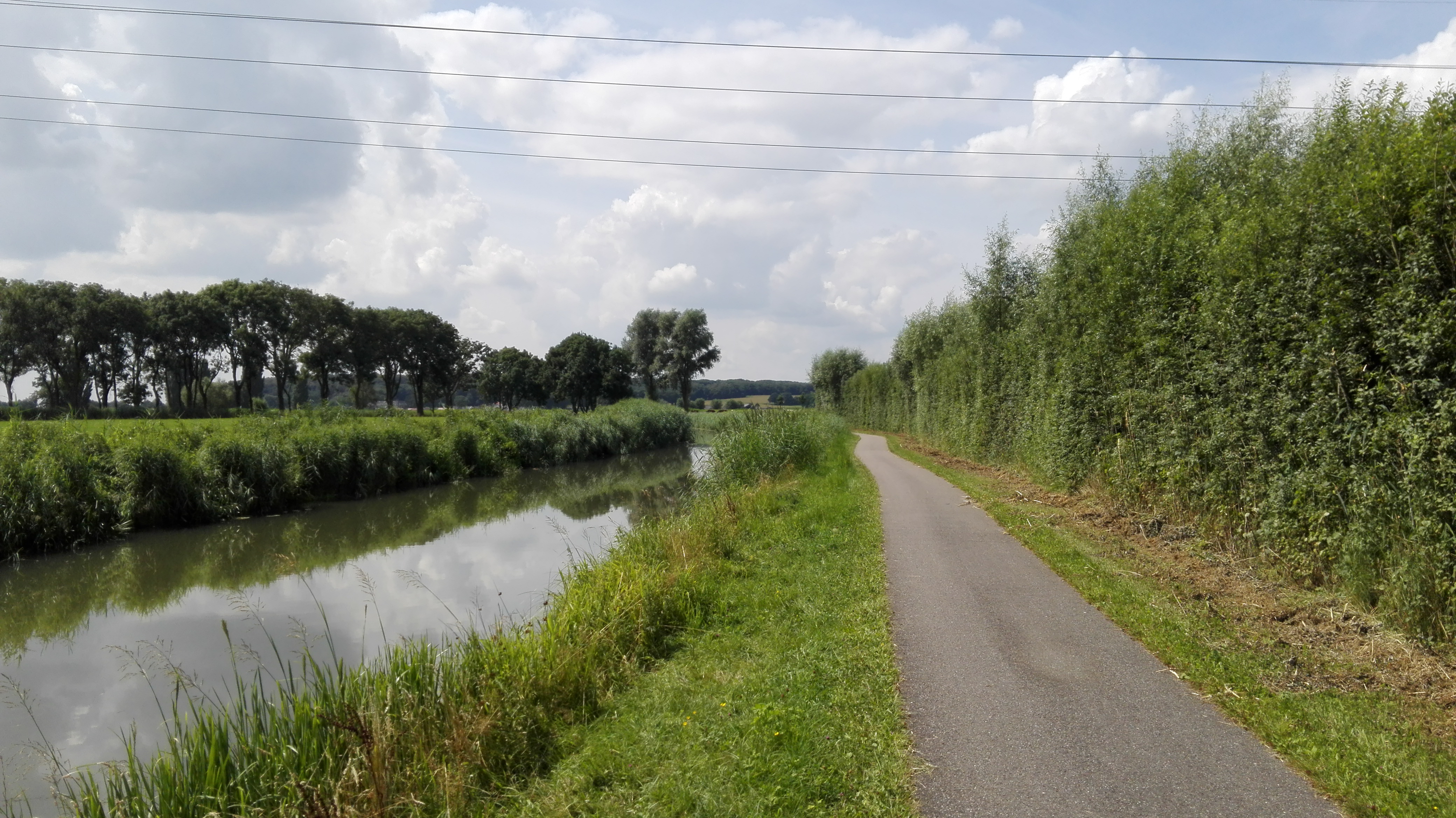 Fietspad langs het Valleikanaal in het Binnenveld tussen Wageningen en Achterberg, gezien richting het westen. Op de achtergrond de Grebbeberg.